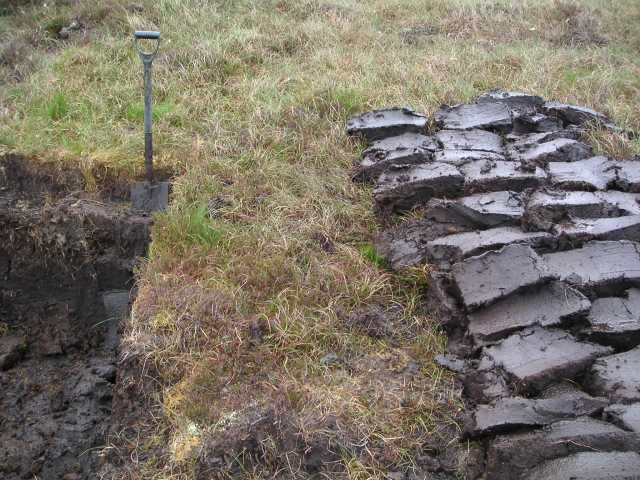 torf